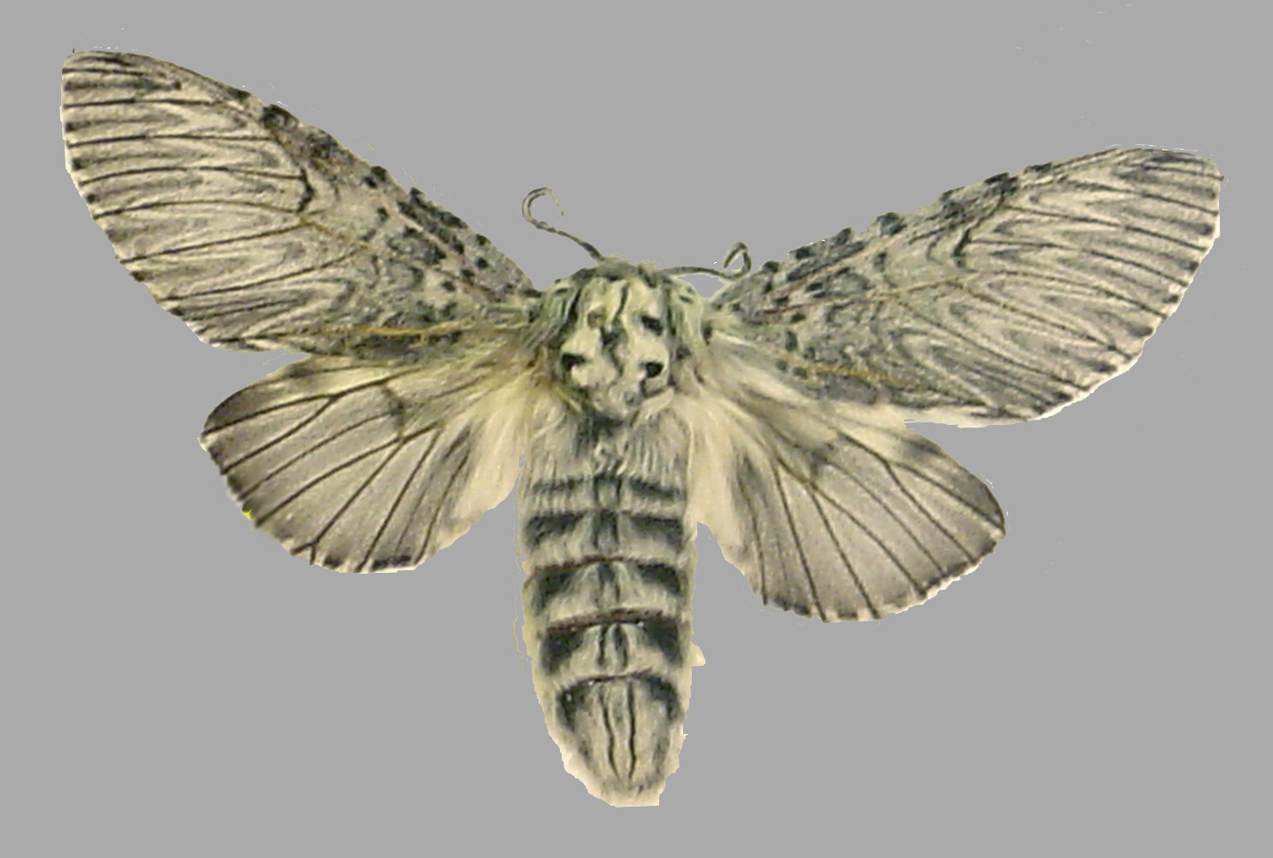 Cerura vinula (Notodontidae, Lepidoptera)